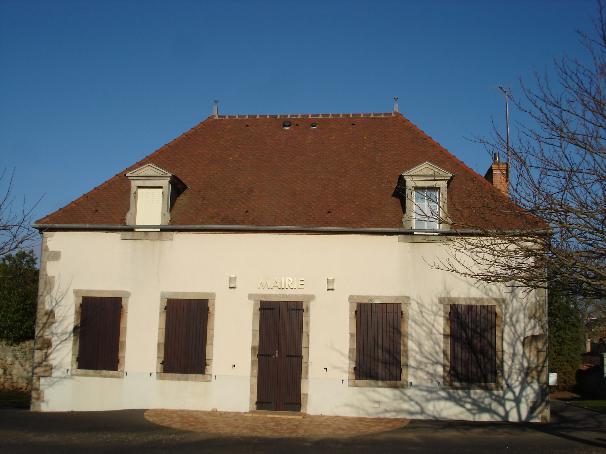 Urciers (36) : La mairie.